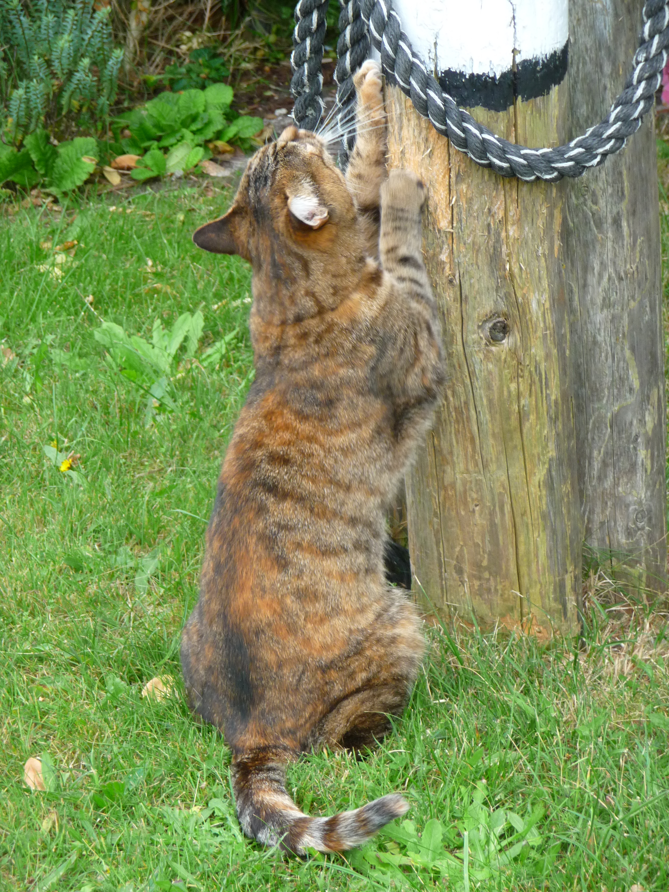 Krallenwetzende Hauskatze